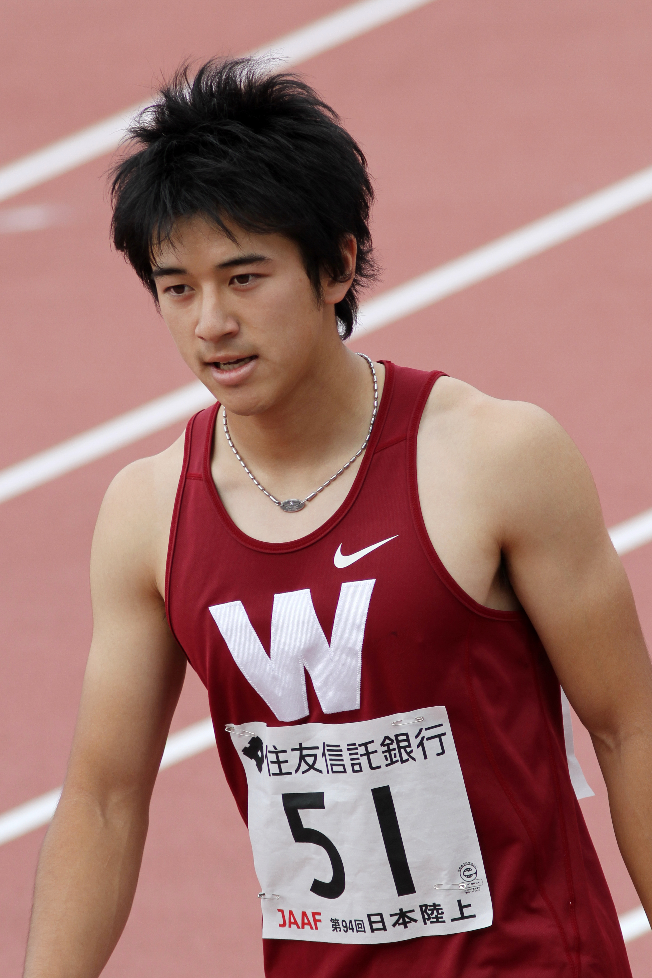 江里口 匡史(早稲田大学) 第94回日本陸上競技選手権大会